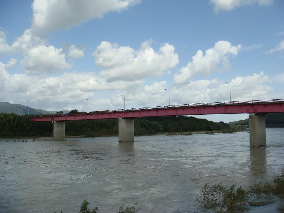 国道１９３号穴吹橋